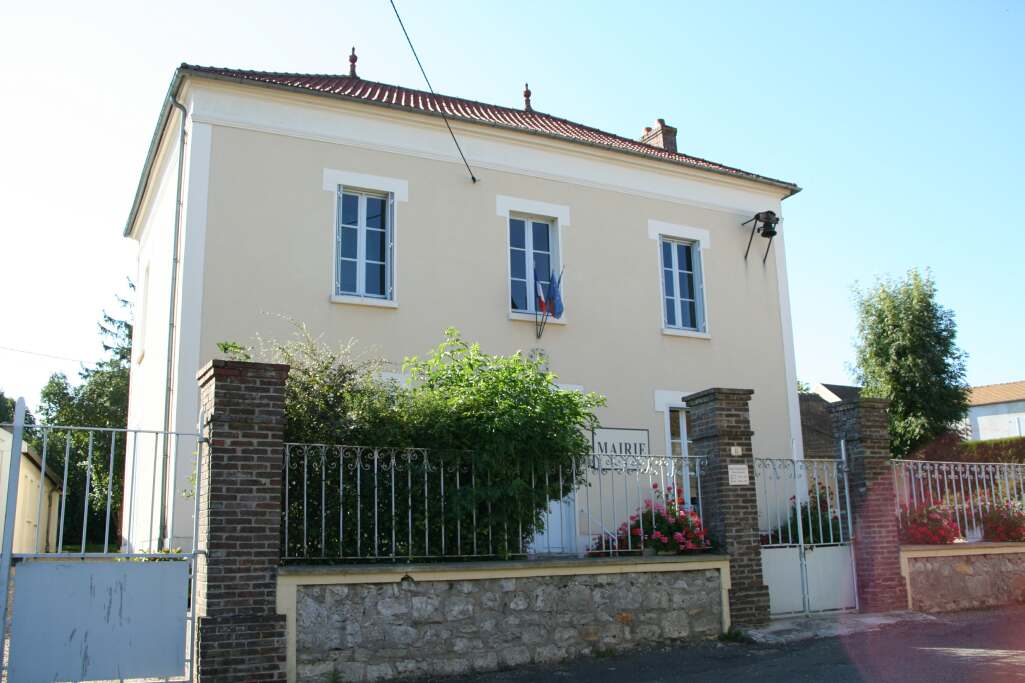 Mairie de Montchauvet - Yvelines (France)